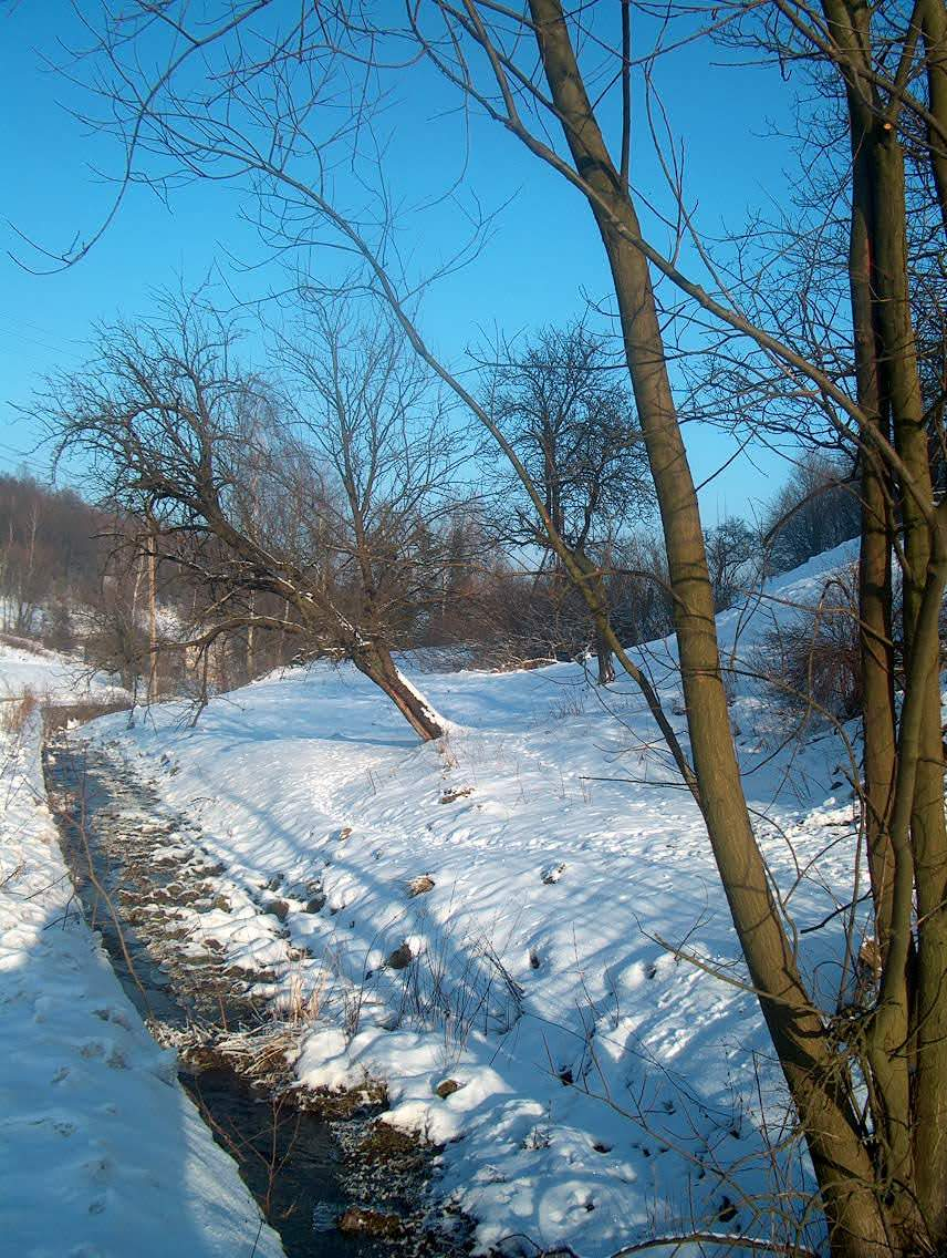 Pogórze Izerskie w okolicach wsi Nagórze, gmina Lwówka Śląskiego.